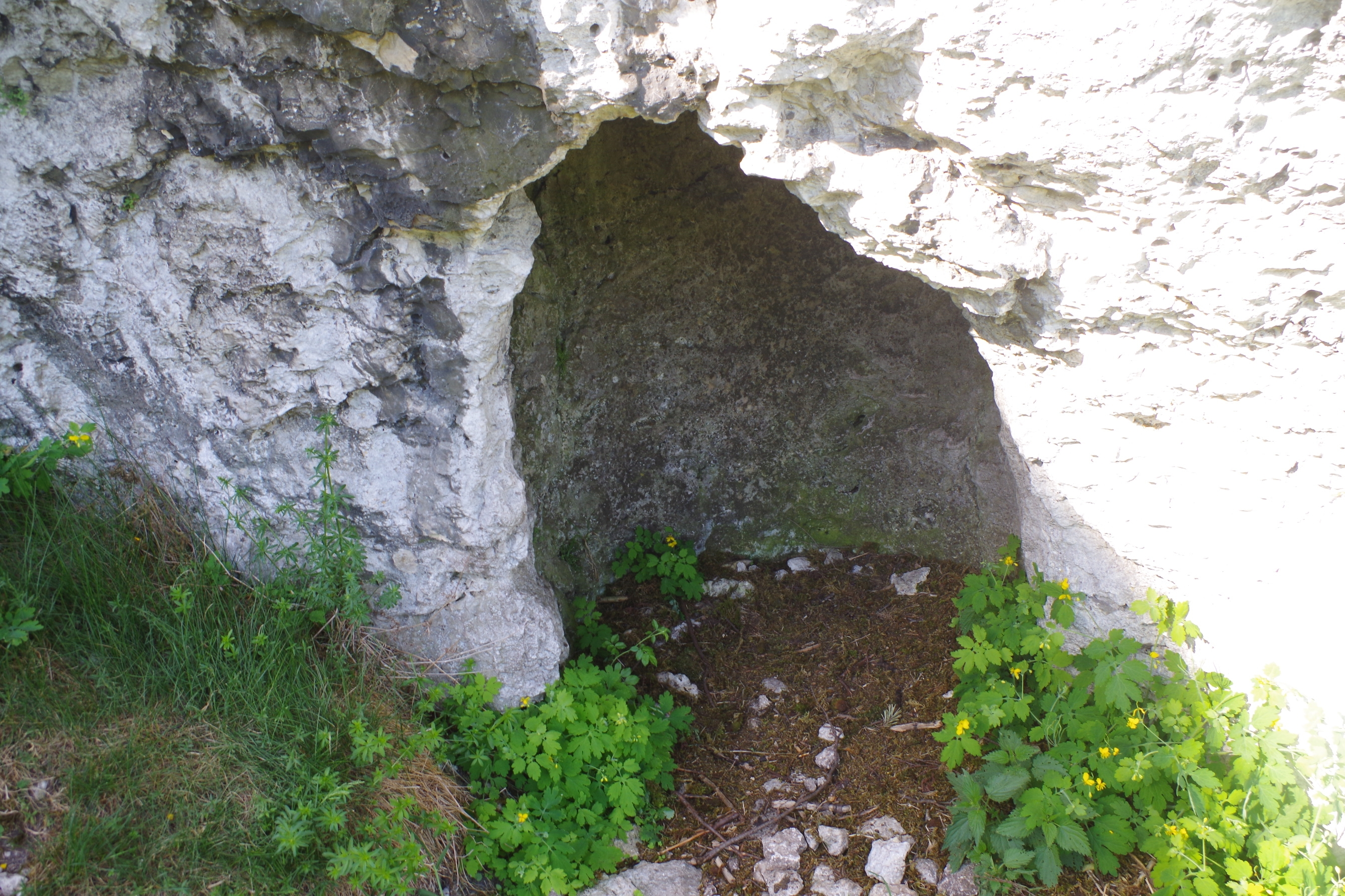 Wylot studni we wschodniej ścianie skały Studnisko w grupie skał Mirowskich